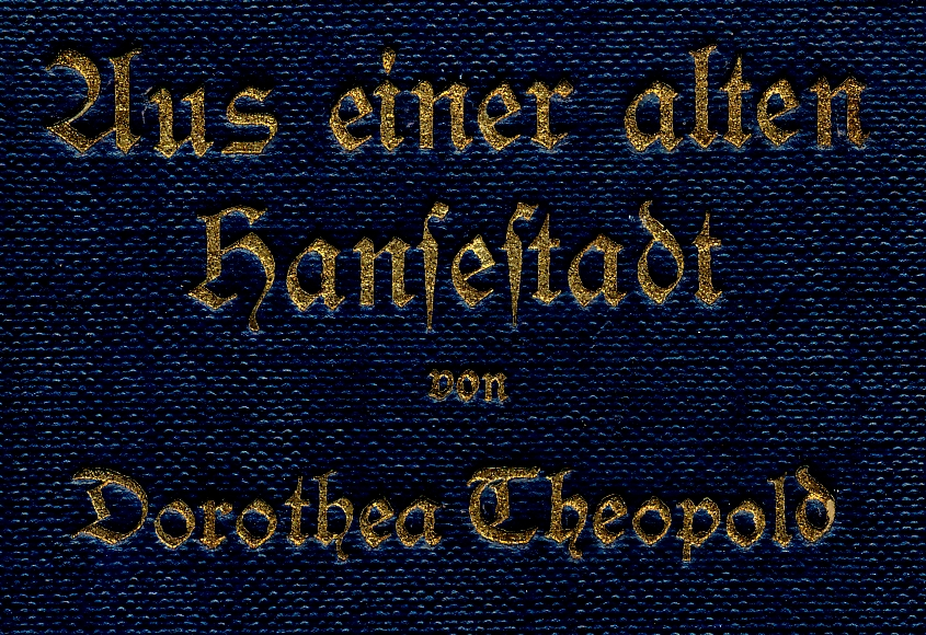 Leinen-Einband-Titel zu Dorothea Theopold: Aus einer alten Hansestadt, Erzählungen aus Lippe, mit Federzeichnungen von Gerhard Wedepohl